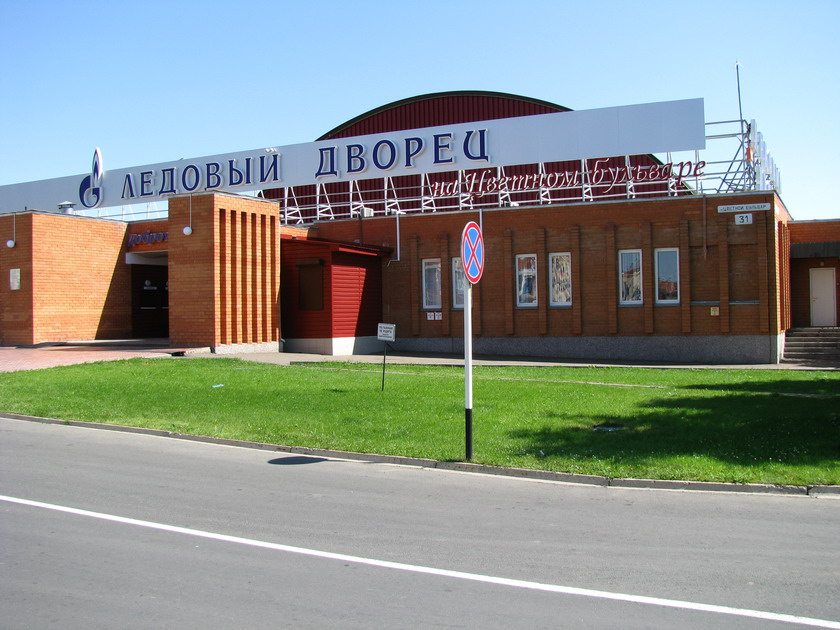 Ледовый дворец в Ростошах